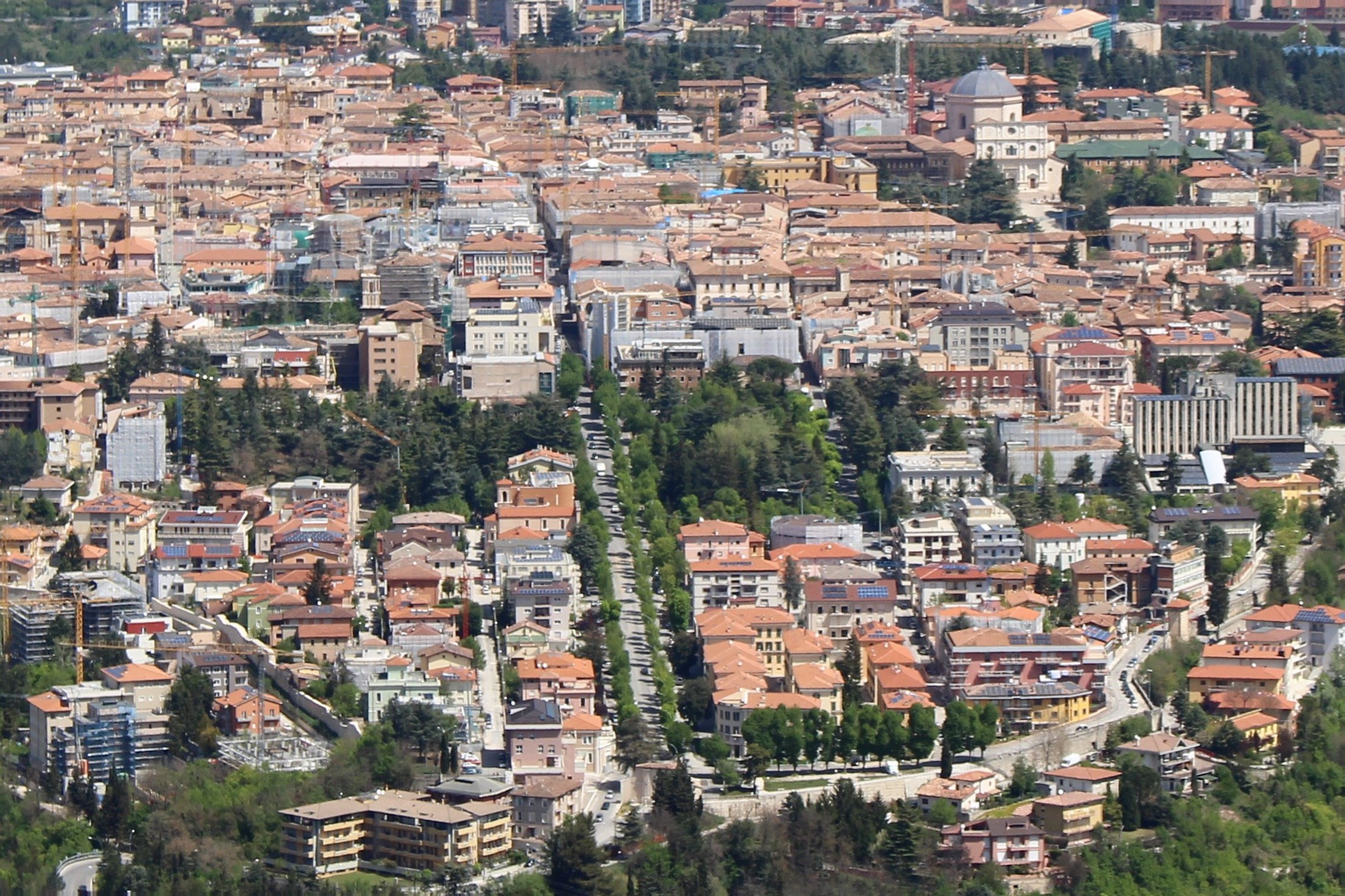 Vista panoramica della parte bassa del centro storico dell'Aquila.